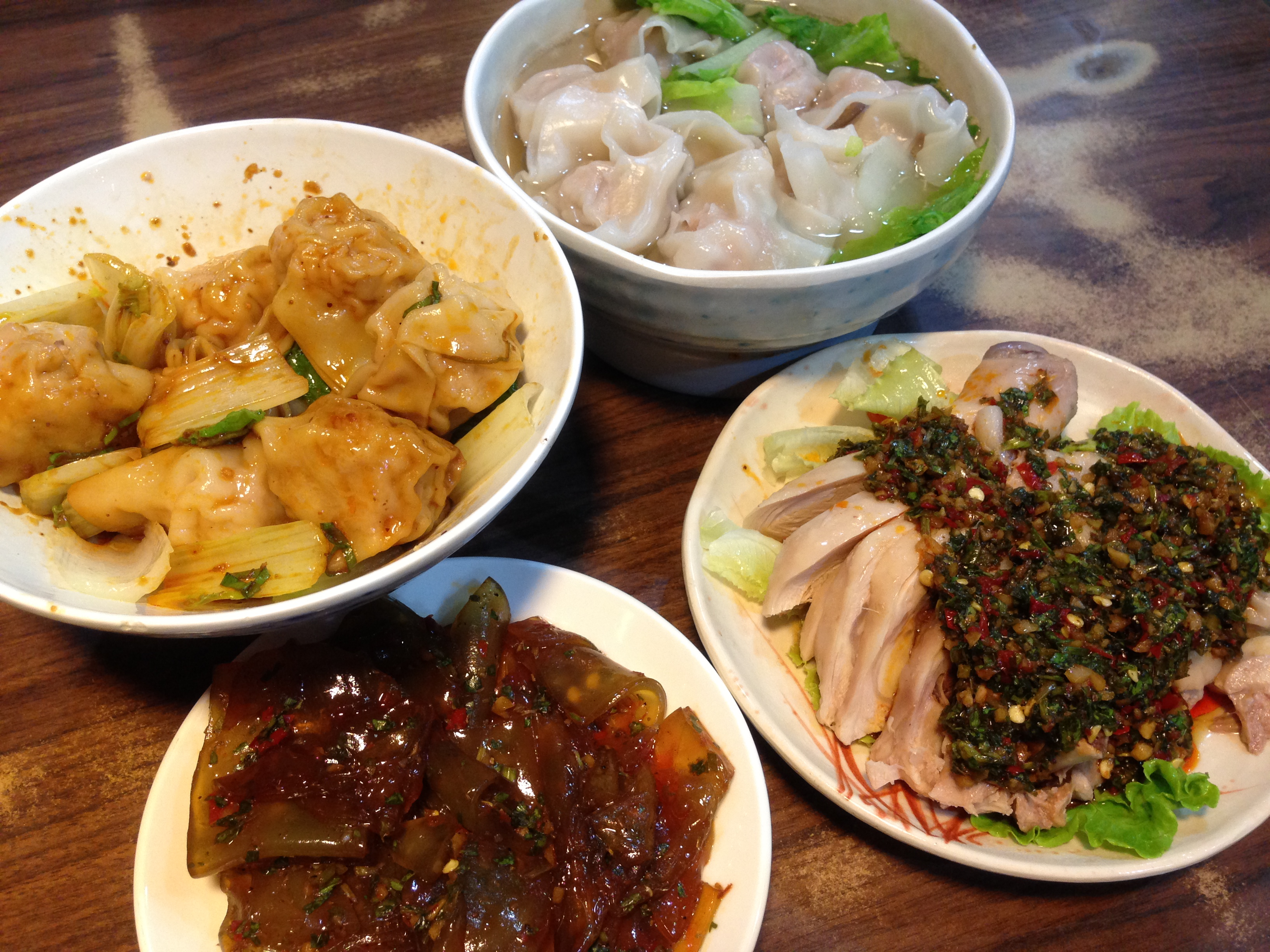 紅油抄手, 原湯抄手, 怪味雞, 川北涼皮,重慶抄手麵食, 台北